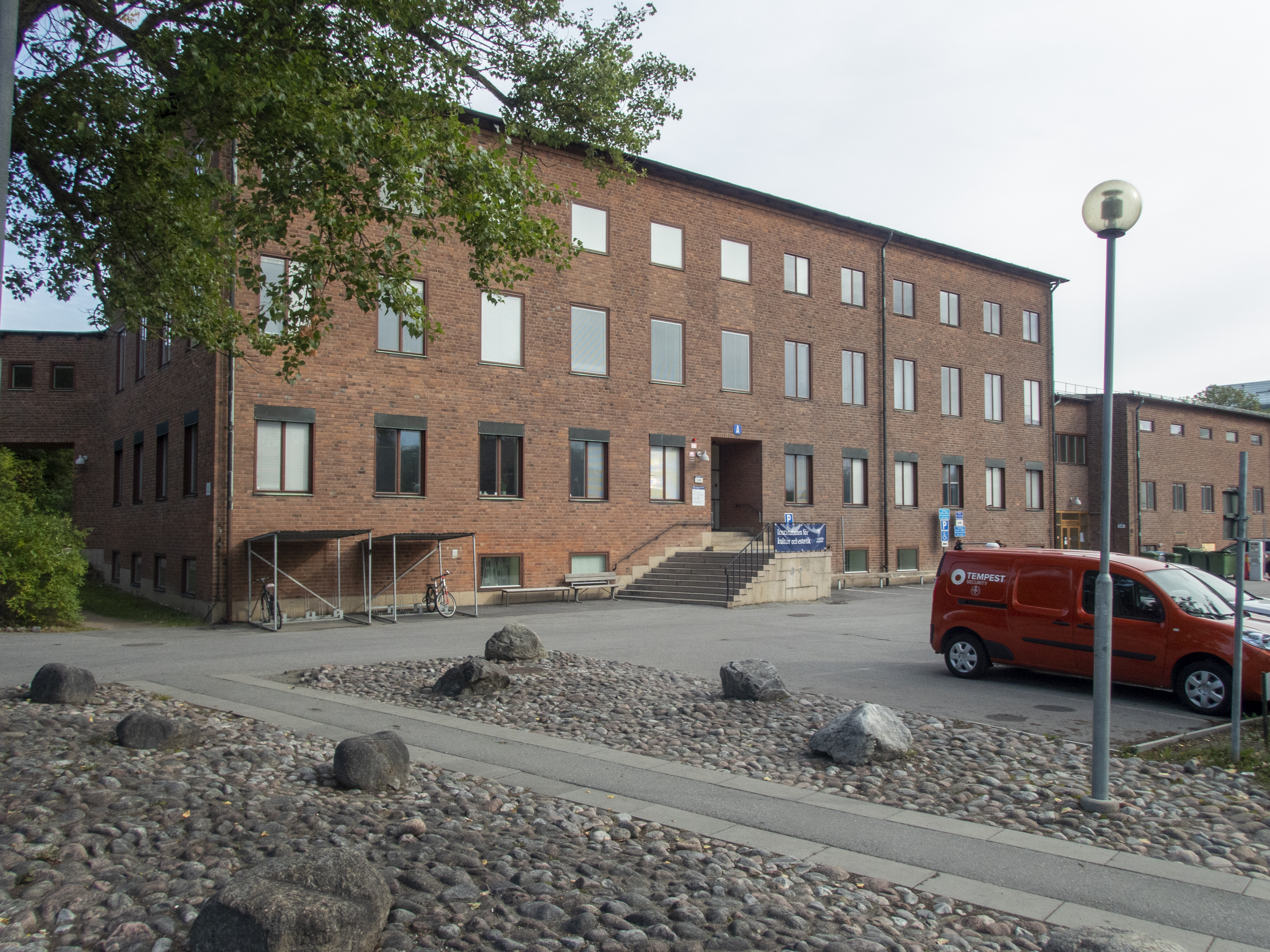 Manne Siegbahnhusen, Frescativägen 22-24 Stockholm. Tidigare Siegbahnlaboratoriet invigt 1936. Arkitekt Gustav Holmdahl